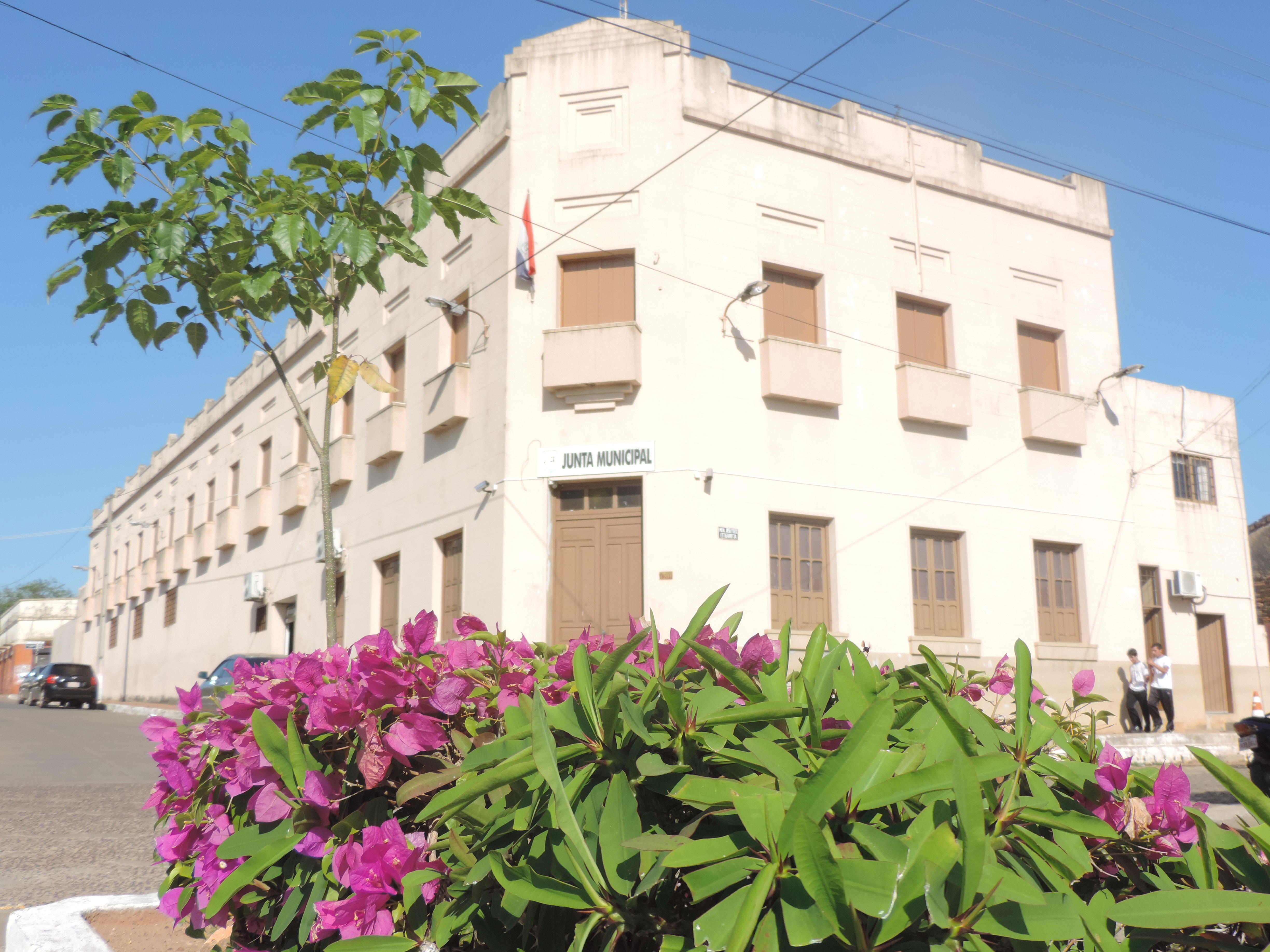 Municipalidad de Carapeguá 2